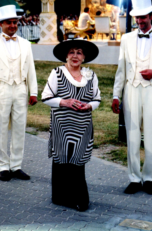 Hanka Bielicka (Anna Weronika Bielicka, 1915-2006) Polish actress. Photo taken in Międzyzdroje during VIII Wakacyjny Festiwal Gwiazd (VIII Holiday Stars Festival) in July 2003.